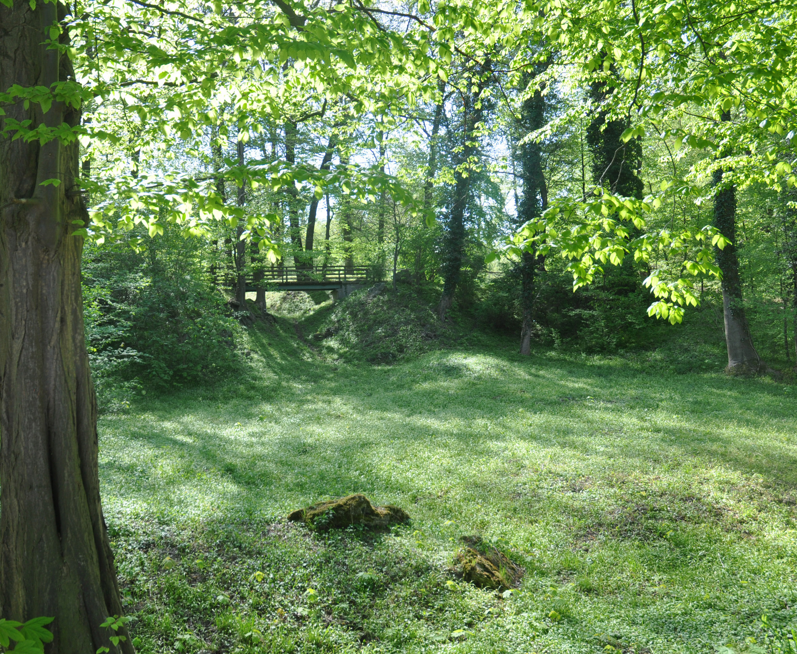 Blick von der Uferchaussee auf die Erlenbrücke